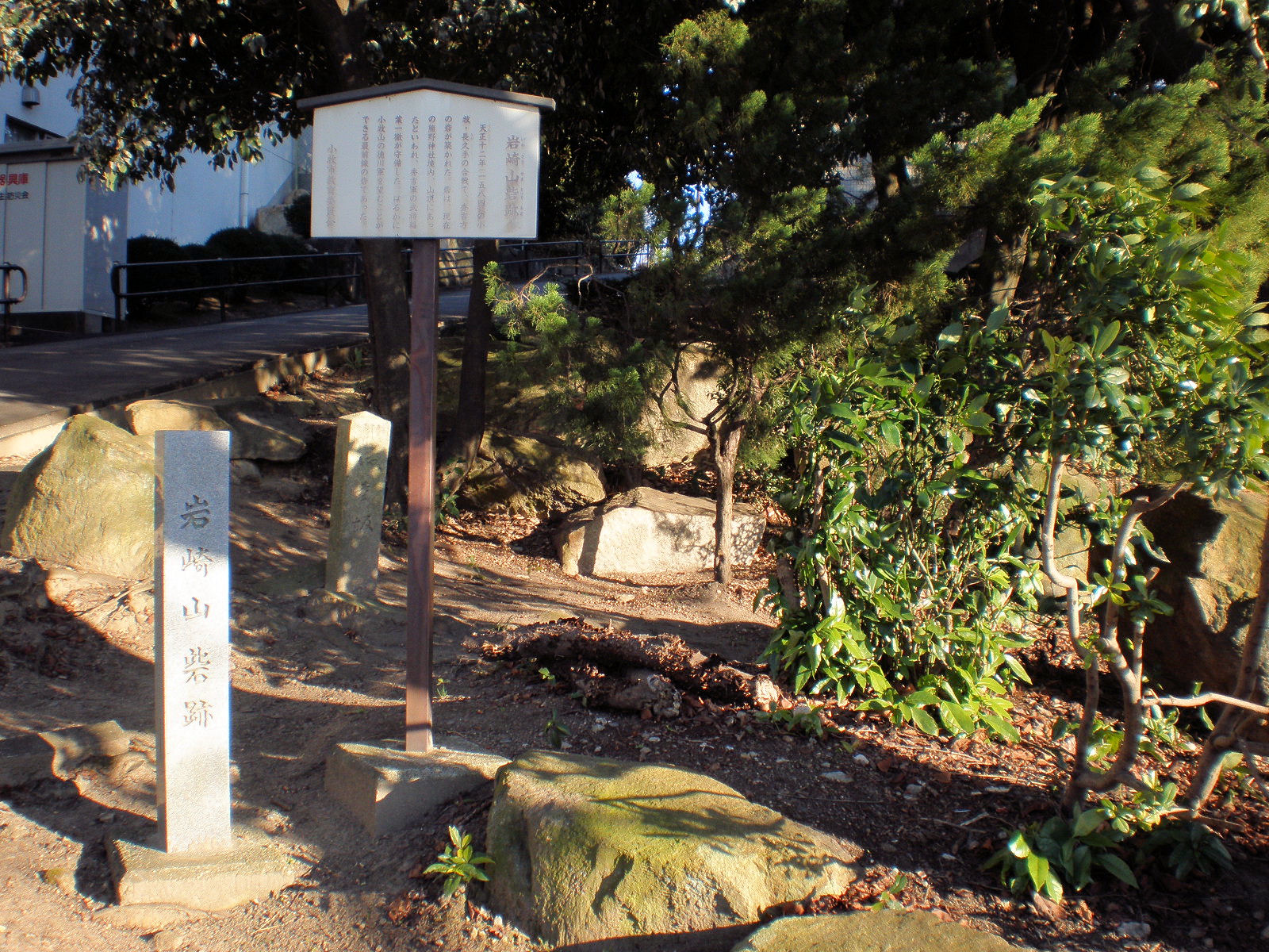 愛知県小牧市の岩崎山にある岩崎山砦跡